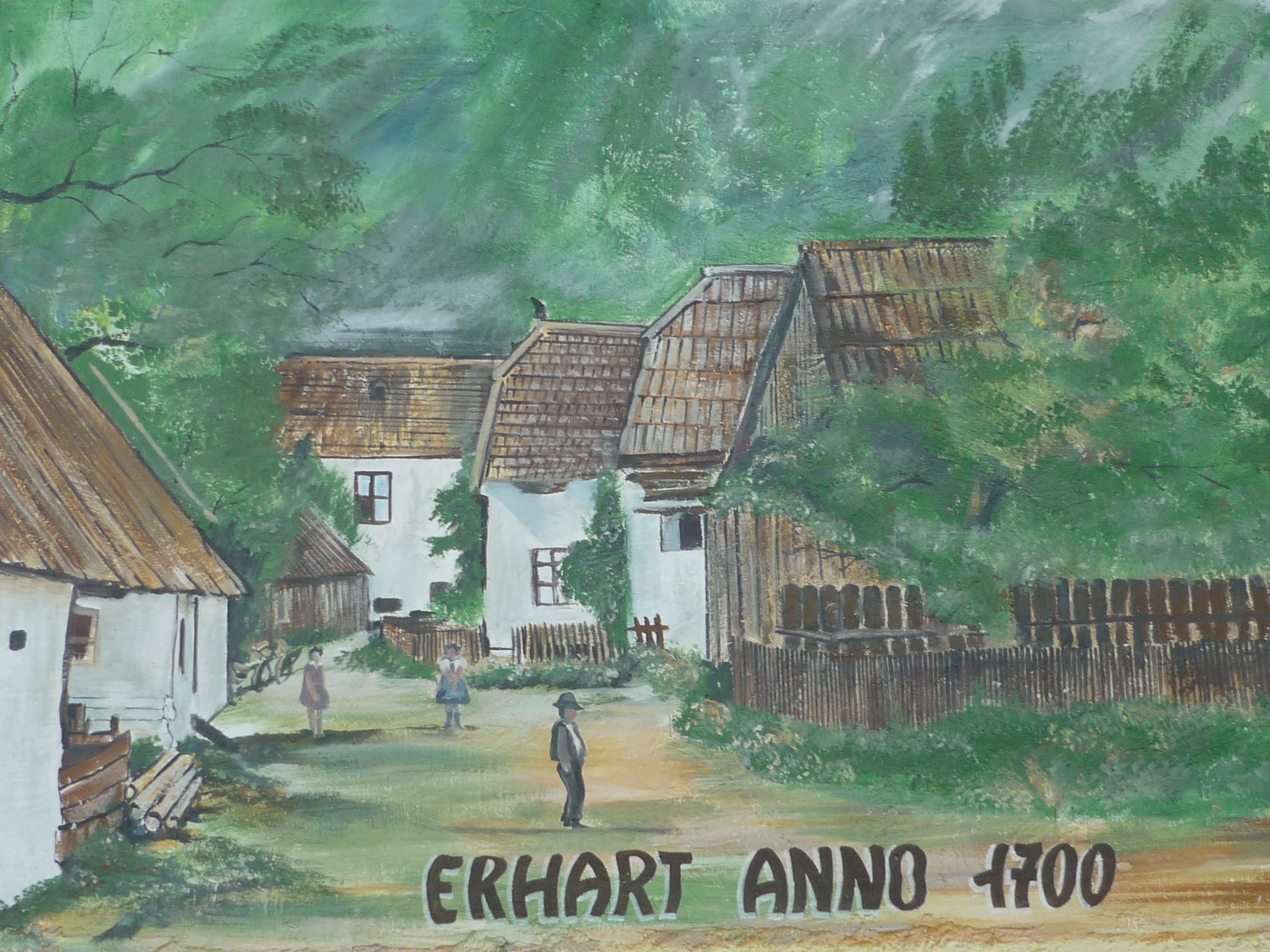 Ein gezeichnetes Bild von Puchberg am Schneeberg um 1700. Das Bild zeigt insbesondere ein paar Häuser des Gemeindegebietes Schneebergdörfl und wurde im Jahr 2001 gemalt.